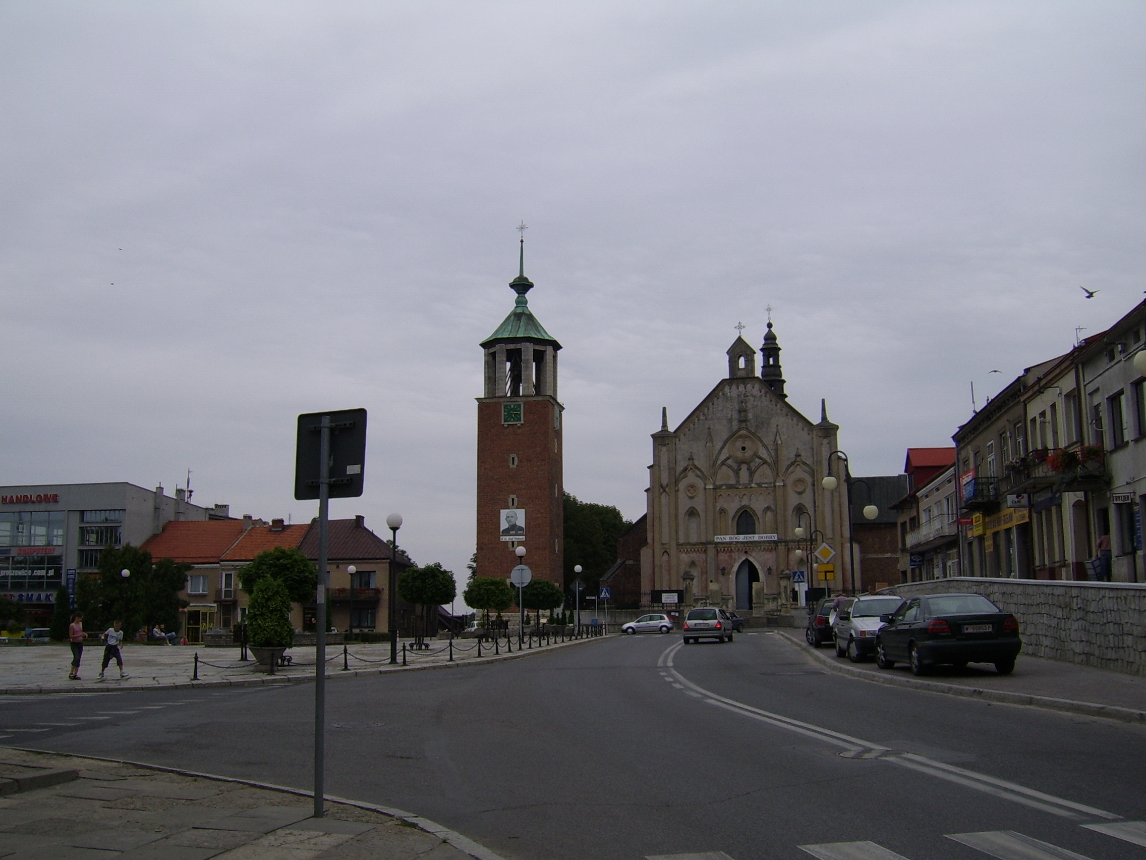 Proszowice - Rynek i fasada kościoła parafialnego.